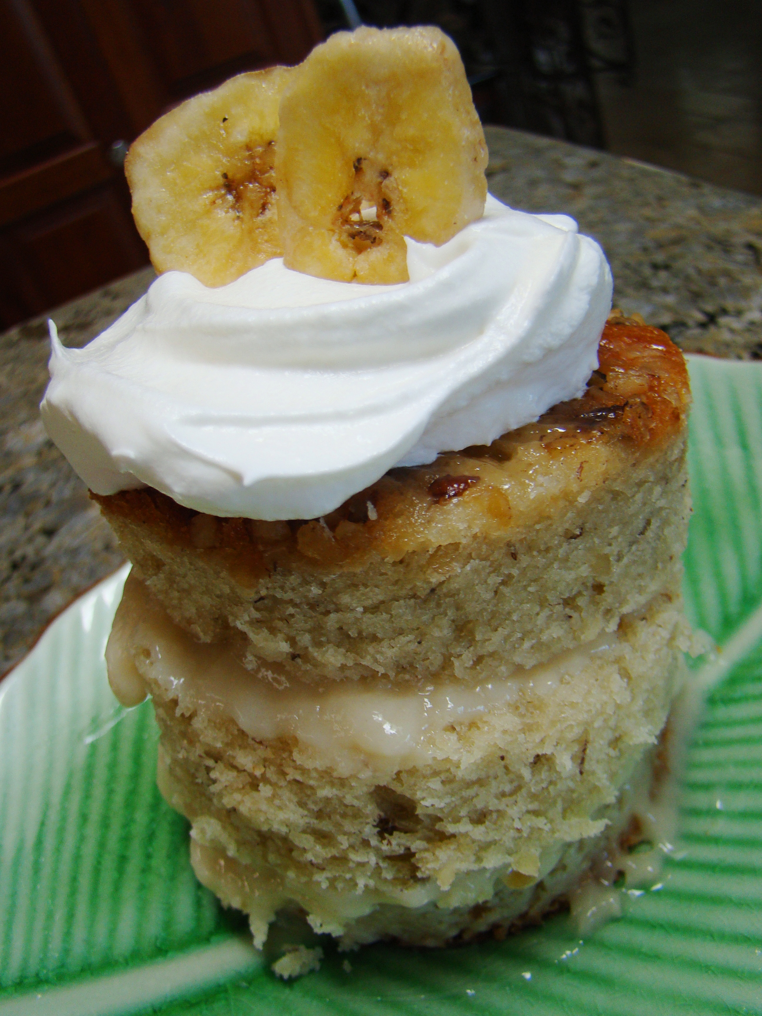 Vegan Banana Celebration Cake